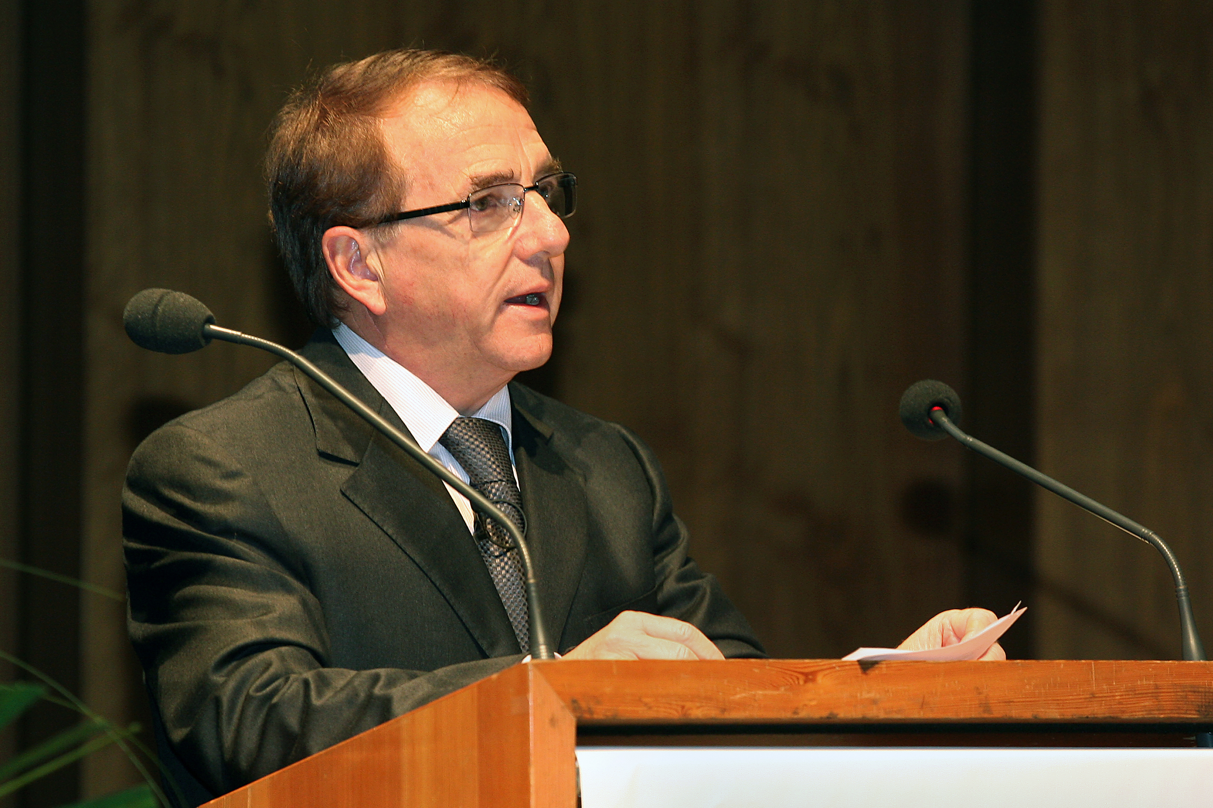 Herbert Zech bei einer Rede --Texaskäs 16:40, 19. Jan. 2011 (CET)